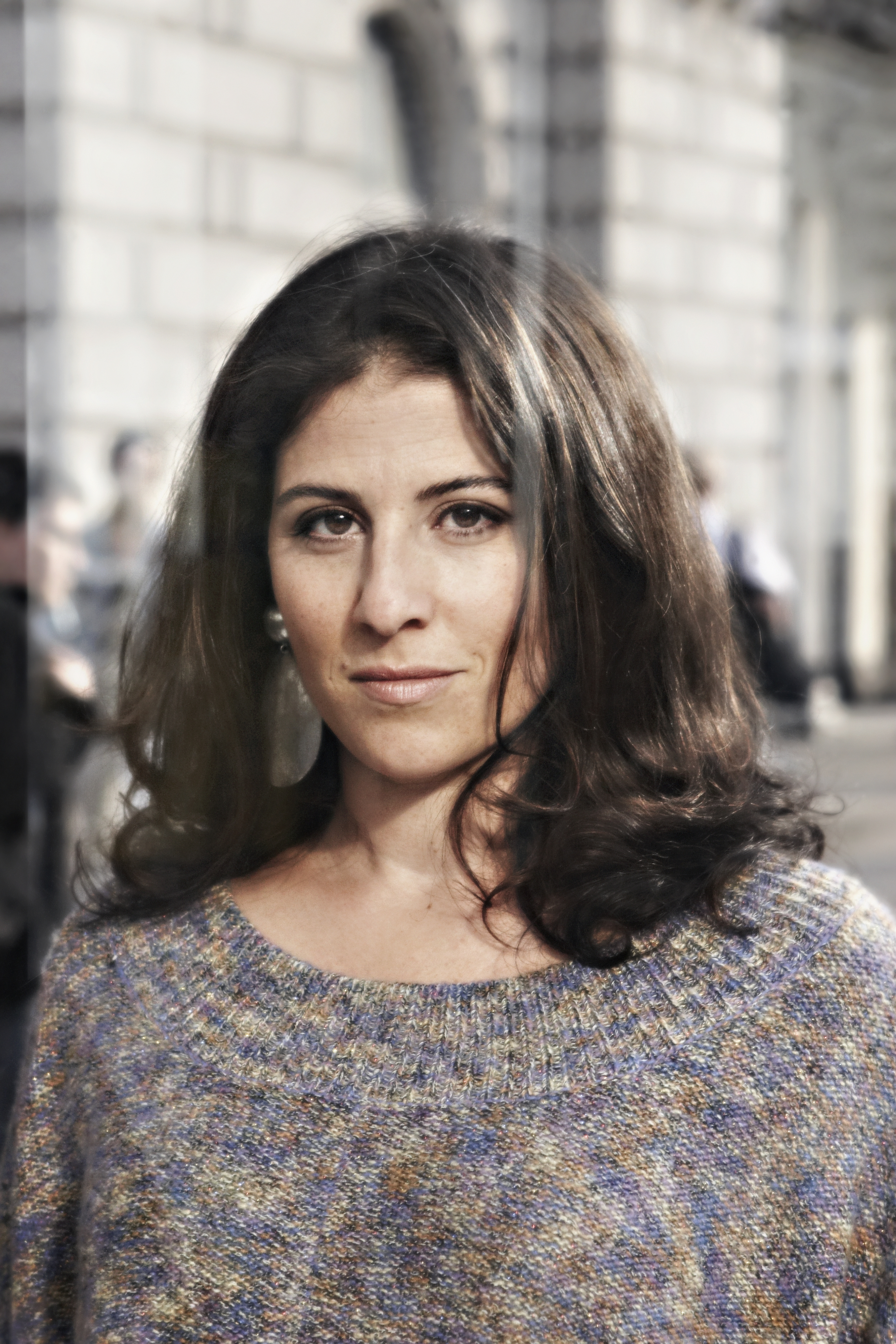 Dilsa Demirbag-Sten, Swedish author